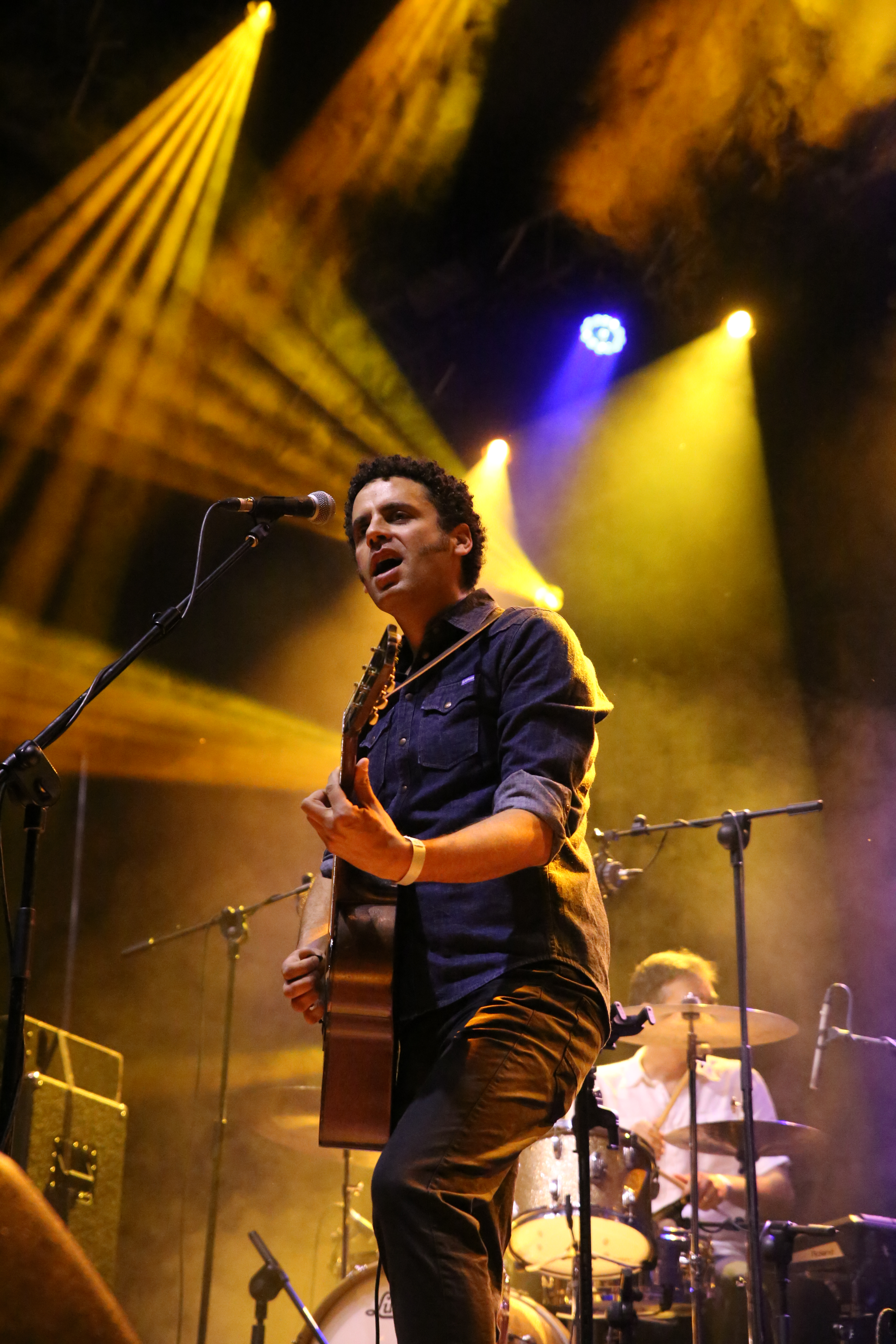 Depedro en el festival Palencia Sonora 2017.